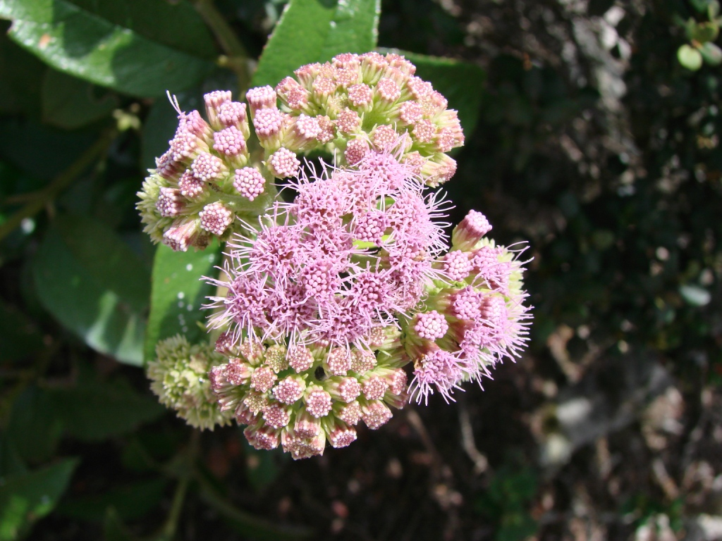 Lepidaploa cotoneaster - ASTERACEAE - Parque Natural Municipal Morro do Pai Inácio - Chapada Diamantina - Palmeiras - Bahia - Brasil.